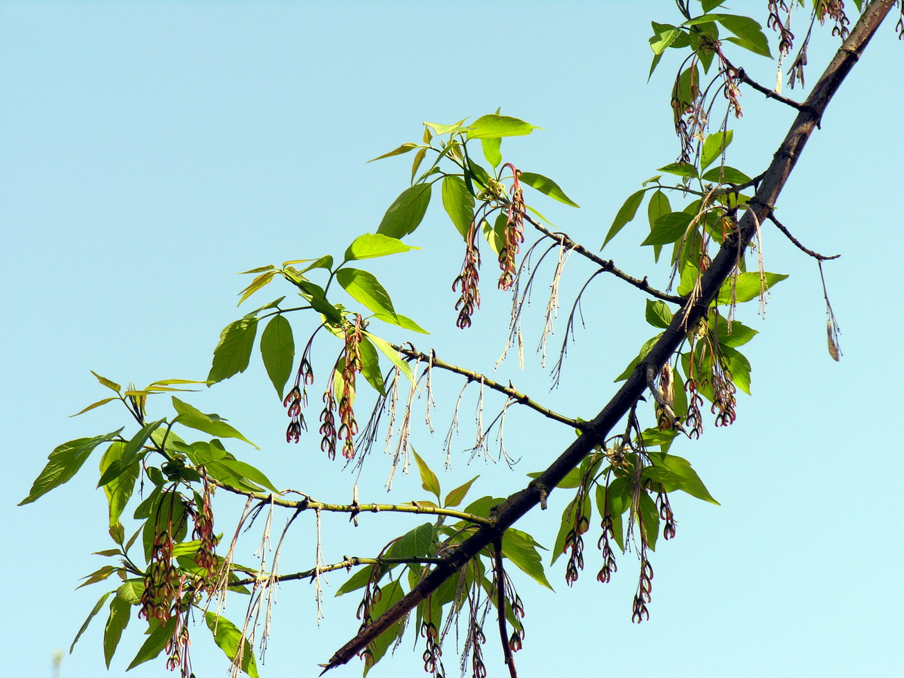 Žydintis uosialapis klevas (Acer negundo) Šeima. Kleviniai (Aceraceae) Fotografavo: Algirdas, 2006 m. gegužės 10 d., Lietuva